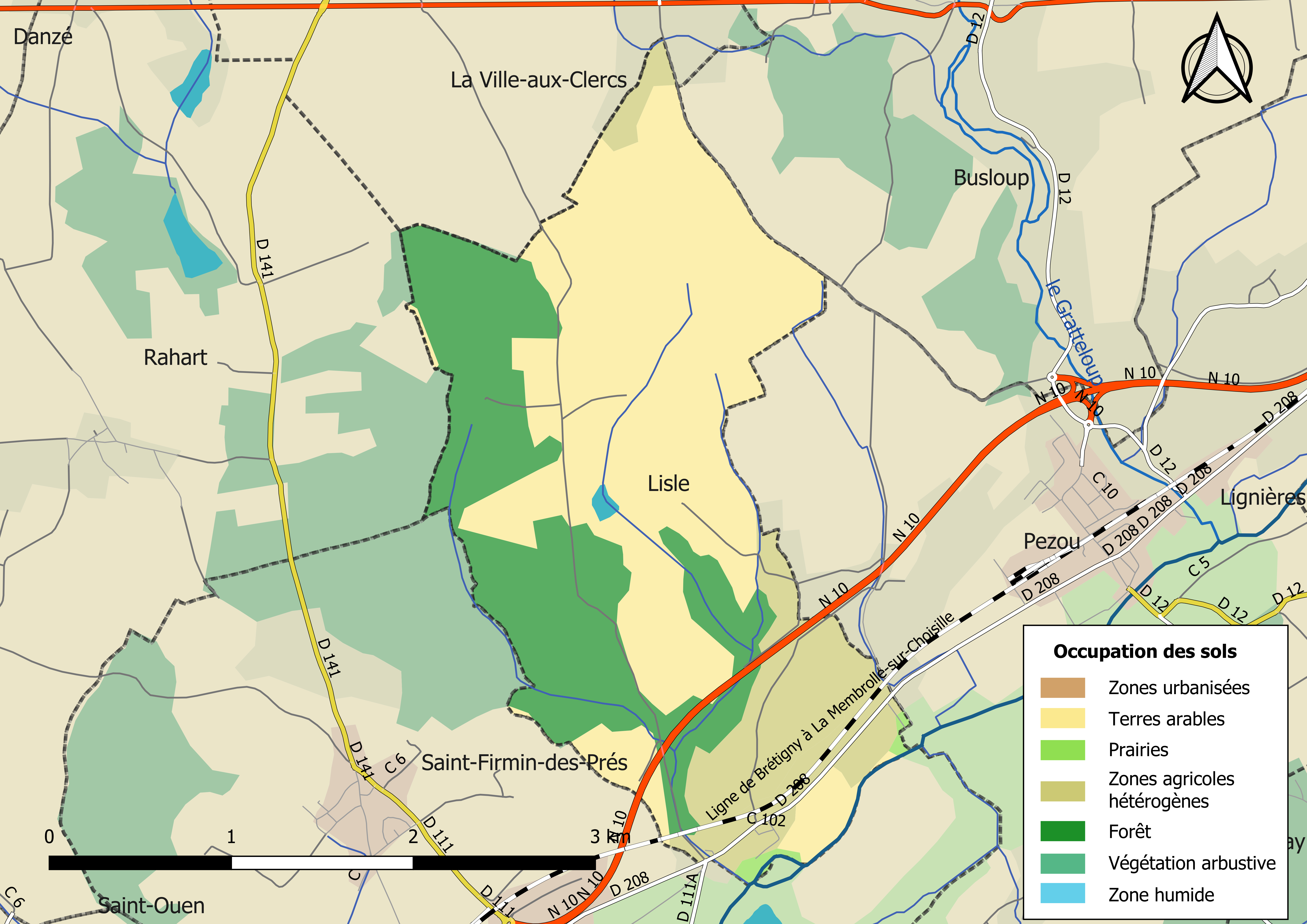 Carte des infrastructures et de l’occupation des sols en 2018 de la commune de Lisle (Loir--Cher) (France).